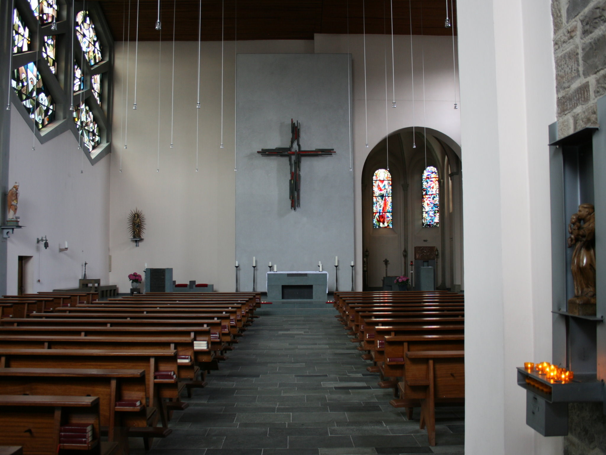 Sankt Mariä Himmelfahrt in Hückeswagen